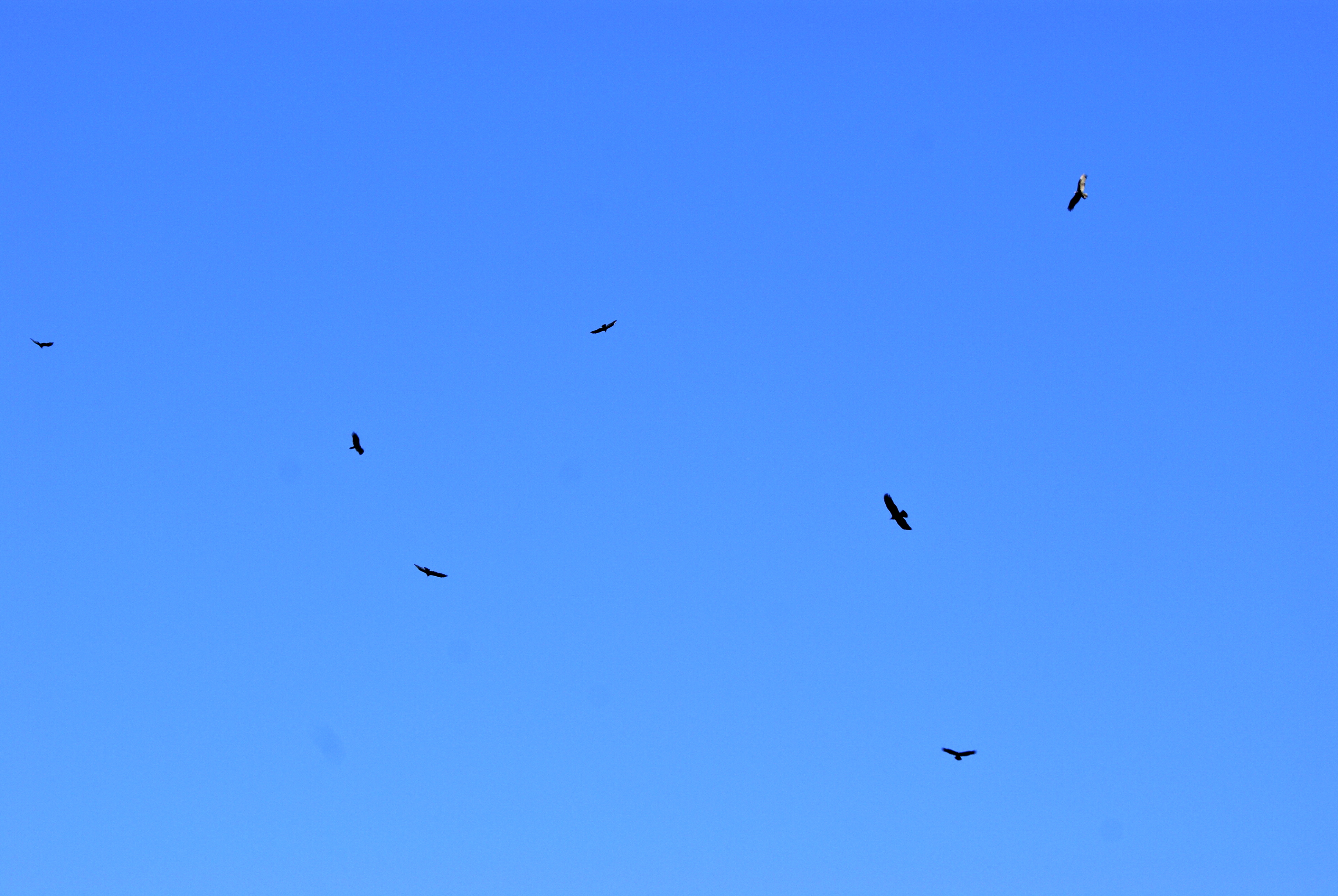 Los cuervos de cabeza roja, negra y amarilla (buitres) son los guardianes de área.